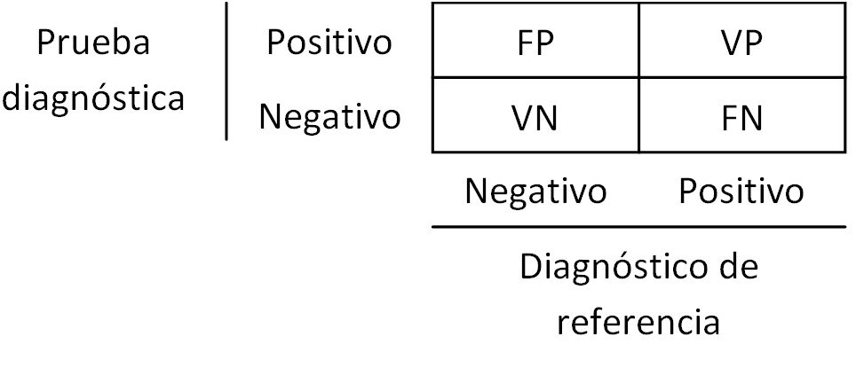 Cuadro de resultados en un aprueba diagnóstica